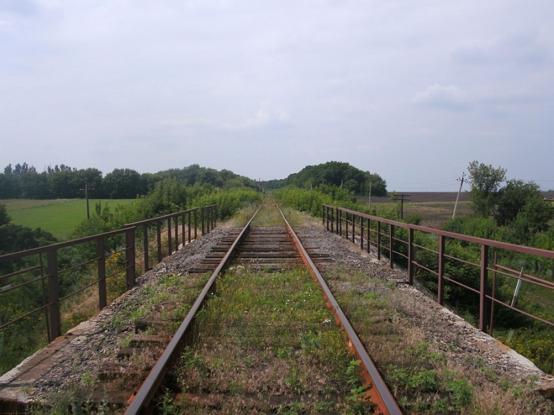 Вид в сторону з.п. 52 км в районі Нововодяного